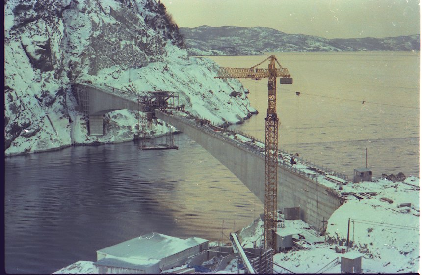 Bilde tatt under bygging av brua